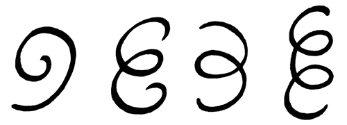 Vertatur, signe de correction typographique : retourner. Différentes versions